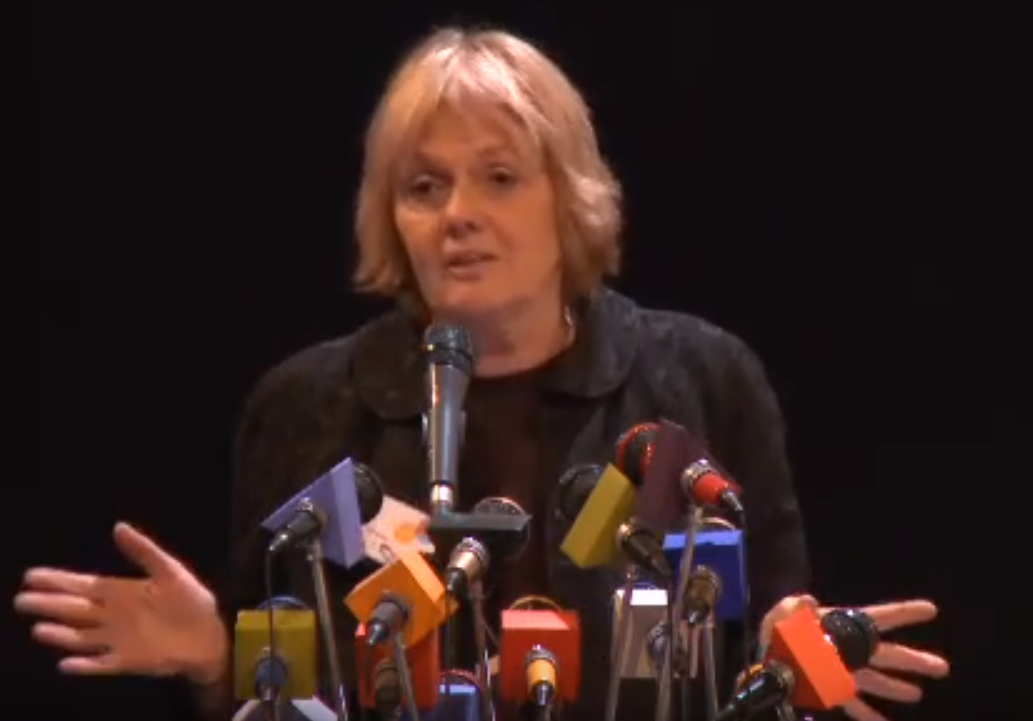 Renny Ramakers, 2012